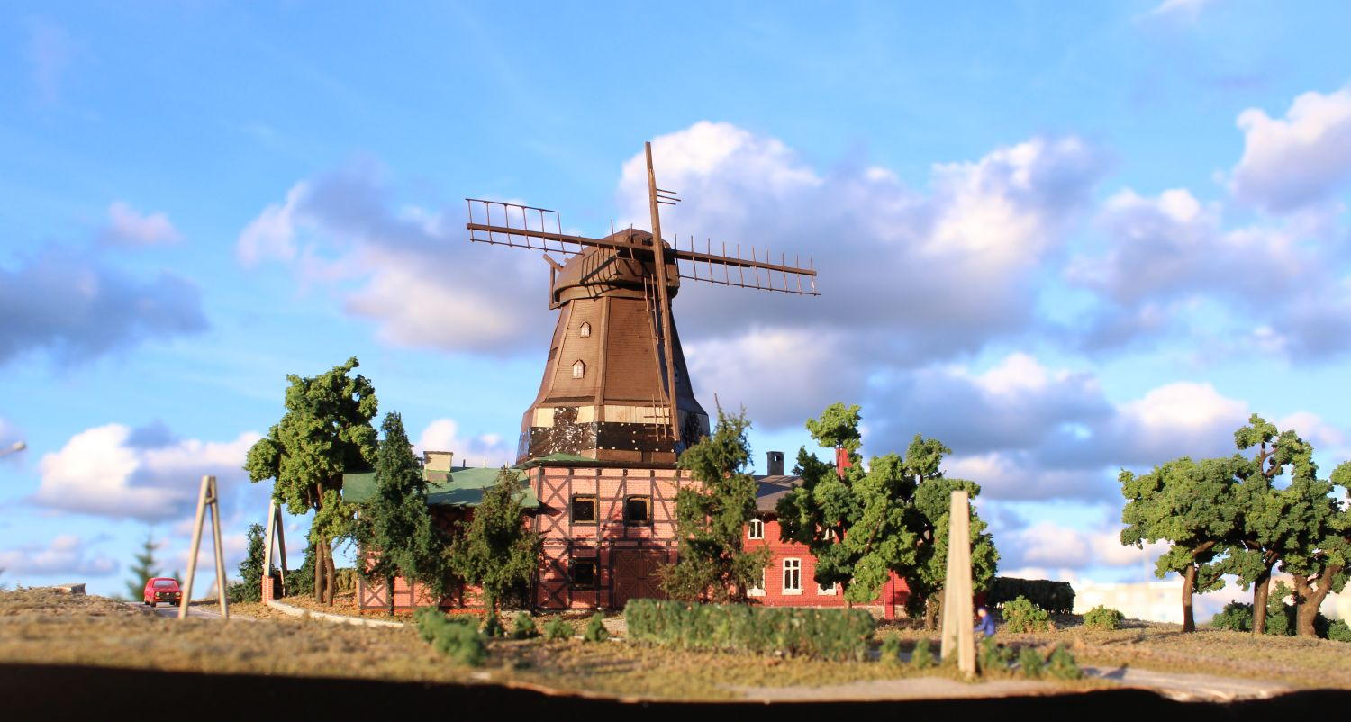 Próba odtworzenia wyglądu wiatraka w Wikrowie - widok perspektywiczny, elewacja południowa.